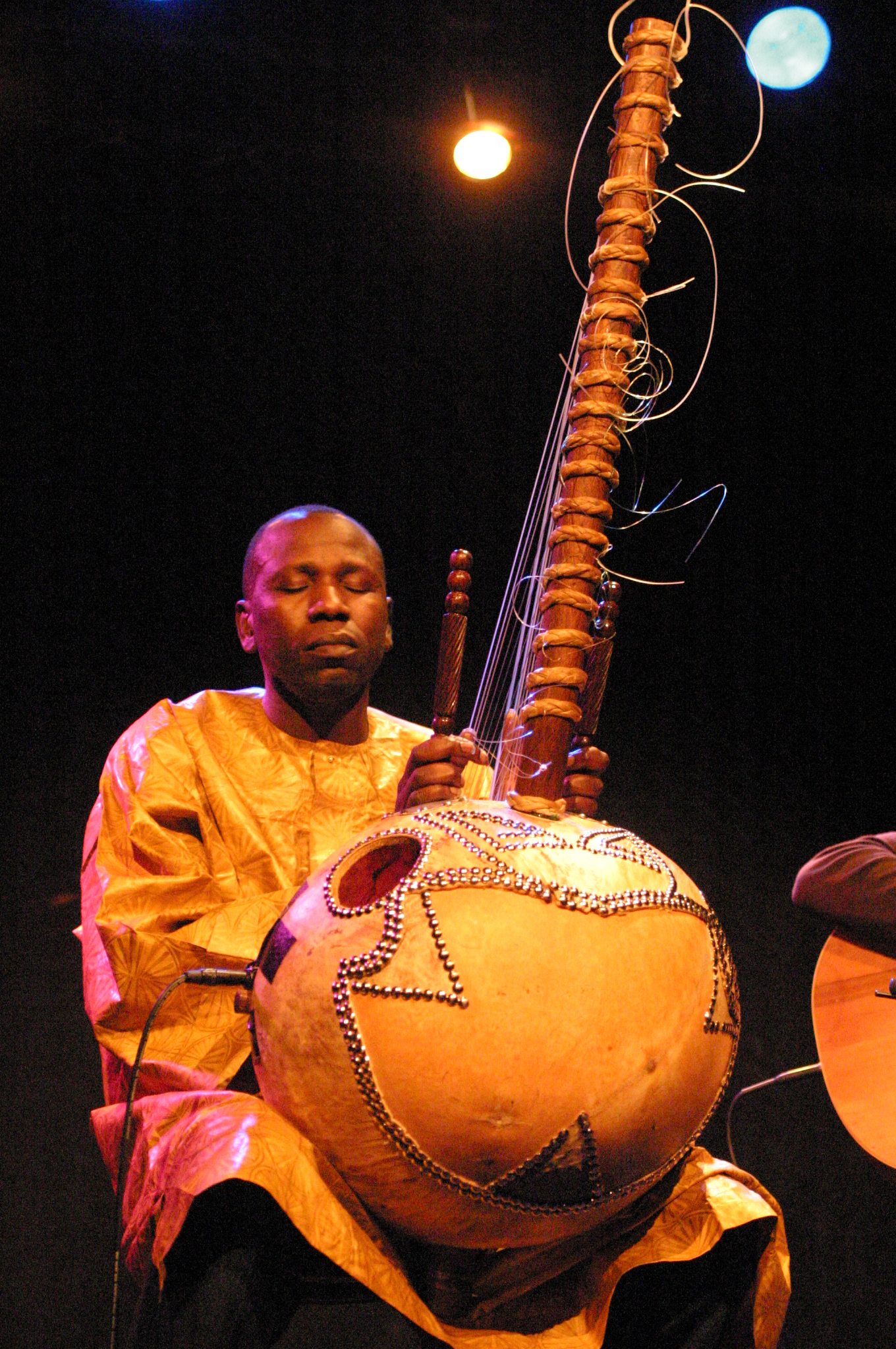 Ballaké Sissoko 2009-04-16